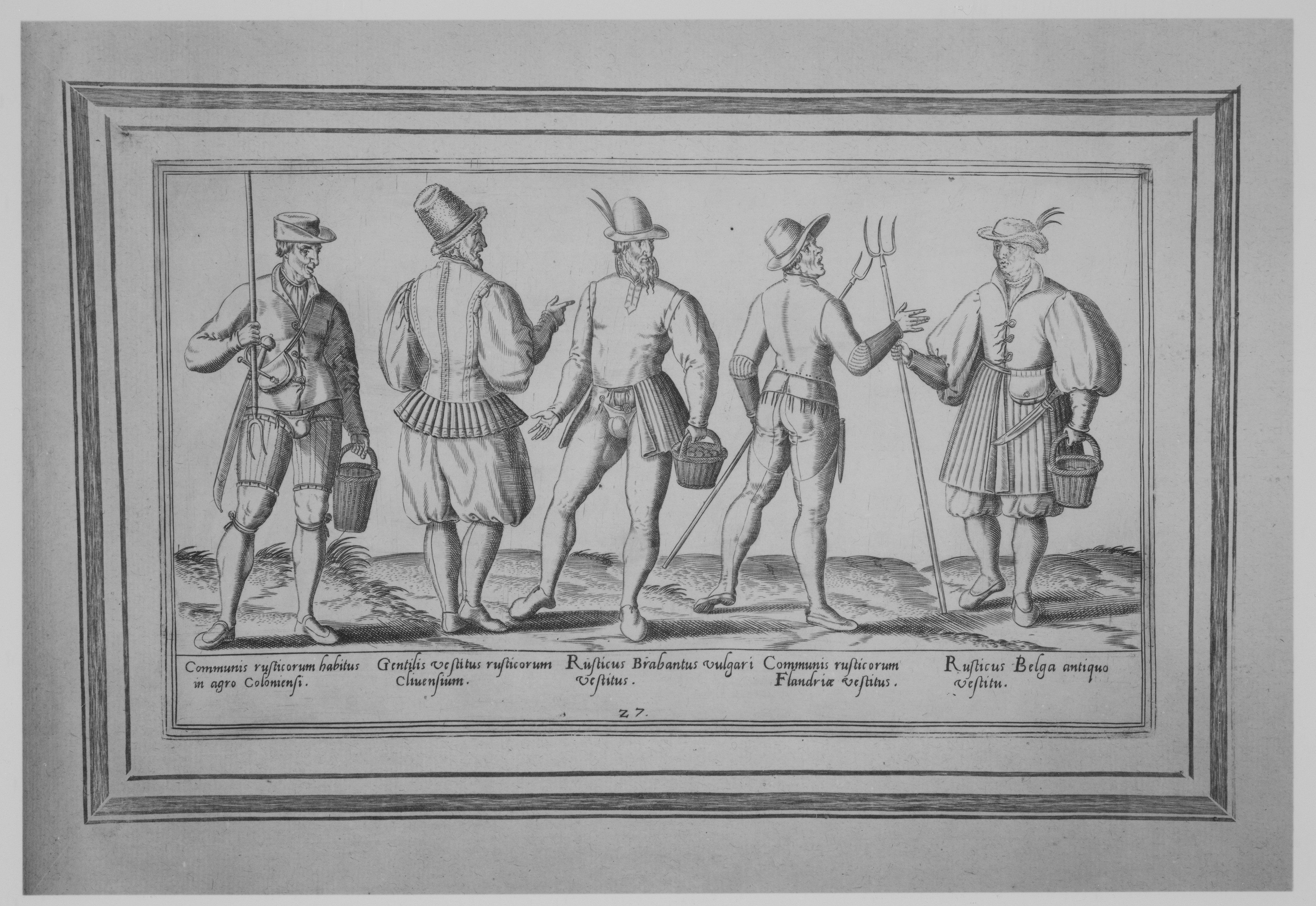 Book; Books